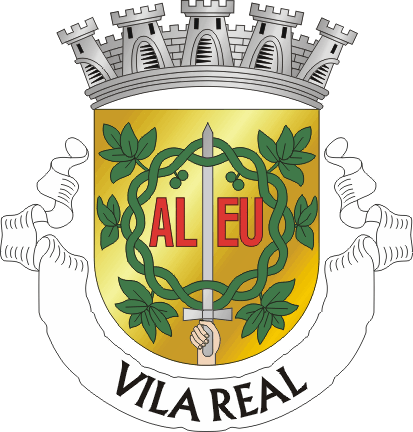 Brasão do Município de Vila Real